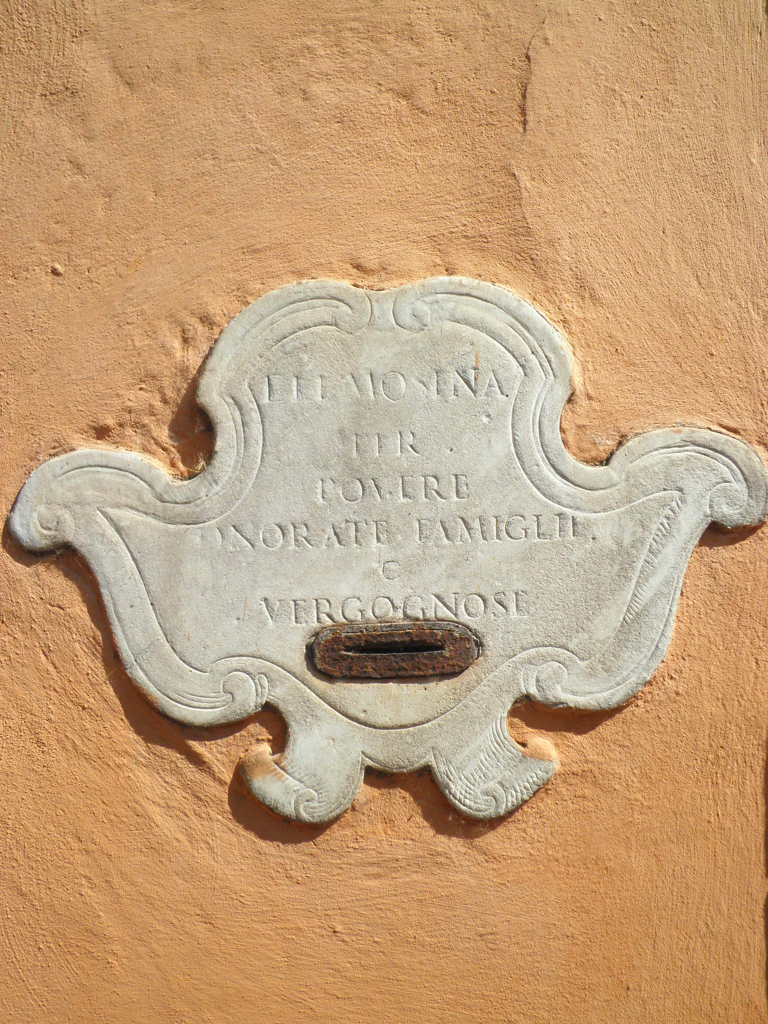 Roma, elemosiniera "per povere onorate famiglie vergognose", sul fianco di San Gregorio a Ponte Quattro Capi